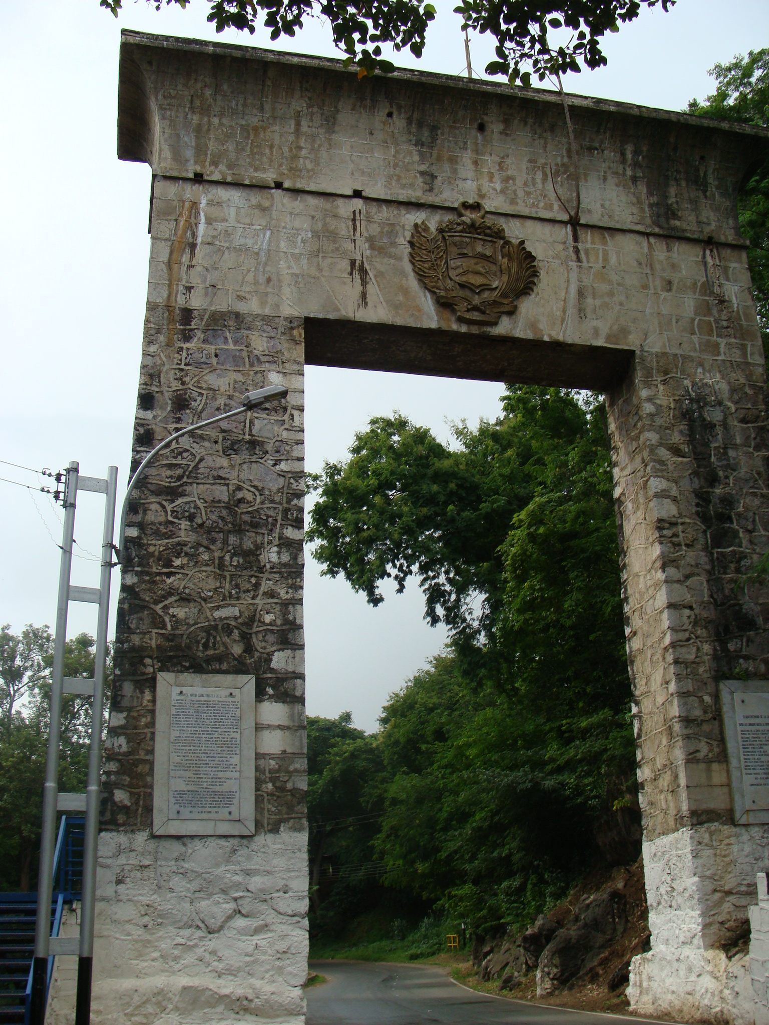 Monumento conmemorativo de las batallas de La Puerta (estado Guárico, Venezuela).